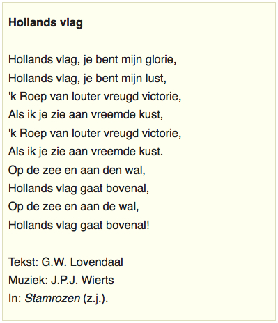 G.W. Lovendaal (1947-1939) en J.P.J. Wierts (1866-1944), tekst liedje 'Hollands vlag, je bent mijn glorie' (ca. 1900-1920). Opgenomen in het liedboek "Kun je nog zingen, zing dan mee" (1906).